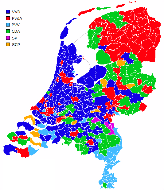 grootste partij in elk gemeente.